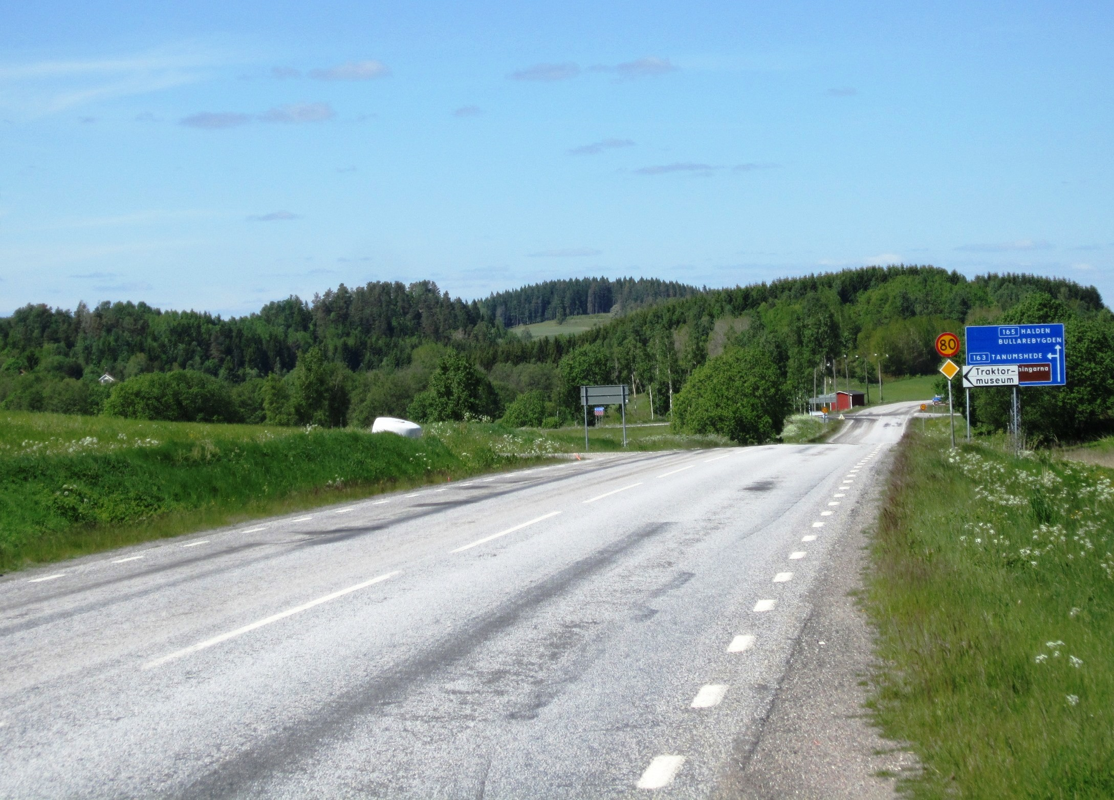 Länsväg 165 mellom Naverstad og norskegrensen